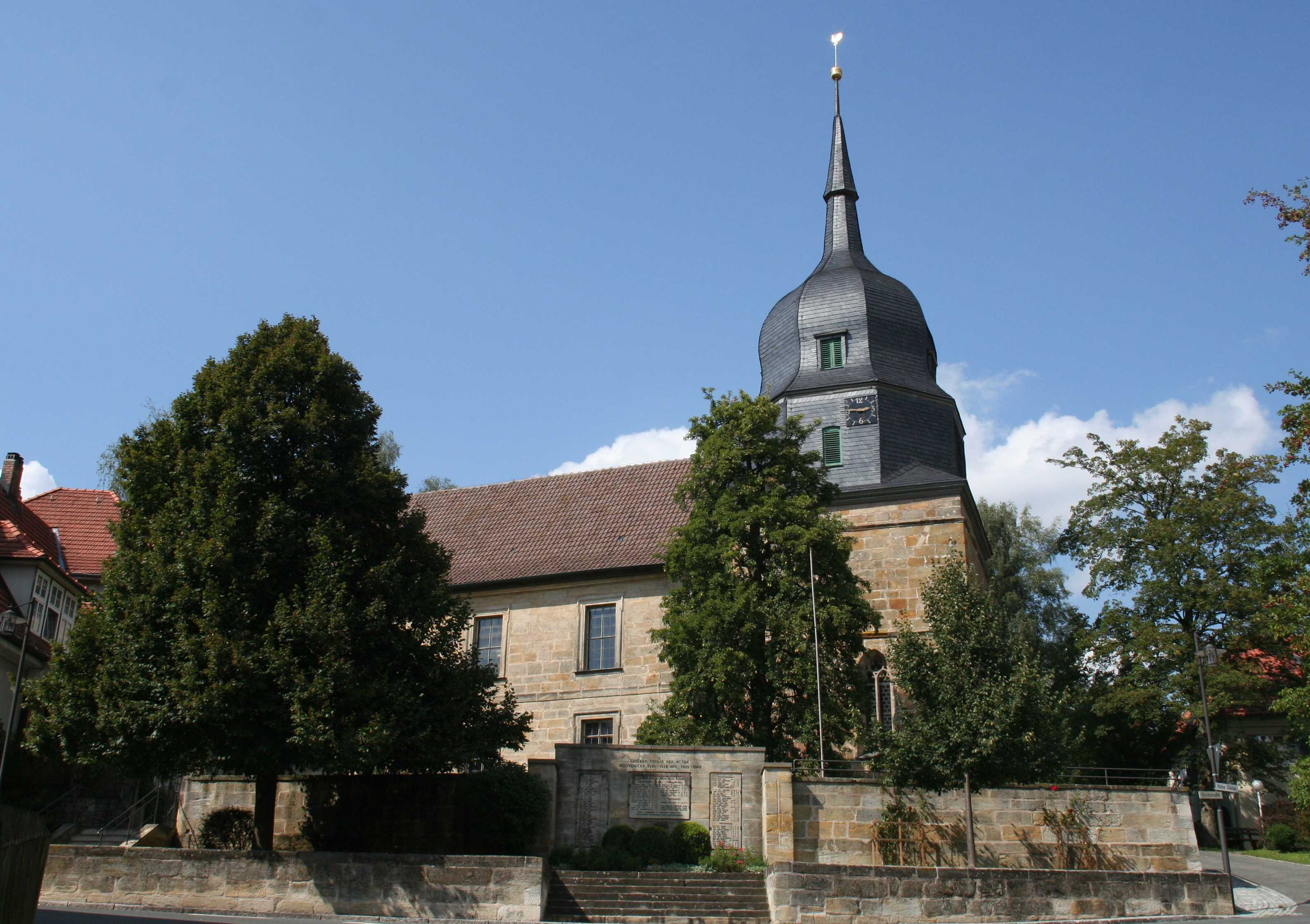 Evang.-Luth. Pfarrkirche Großgarnstadt, Ortsteil von Ebersdorf b.Coburg im Landkreis Coburg in Bayern